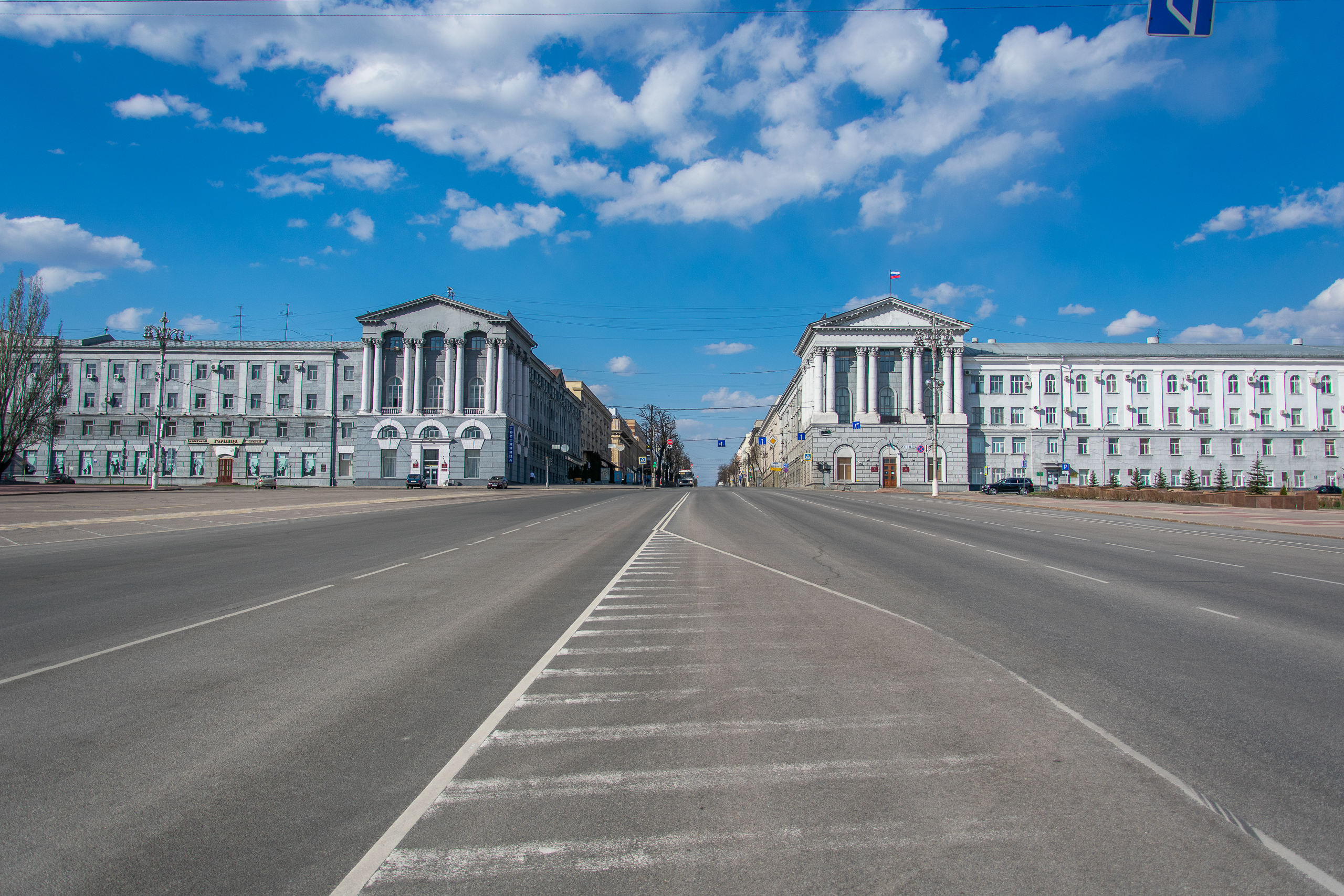 Гостиница "Центральная" и Администрация города Курска на улице Ленина